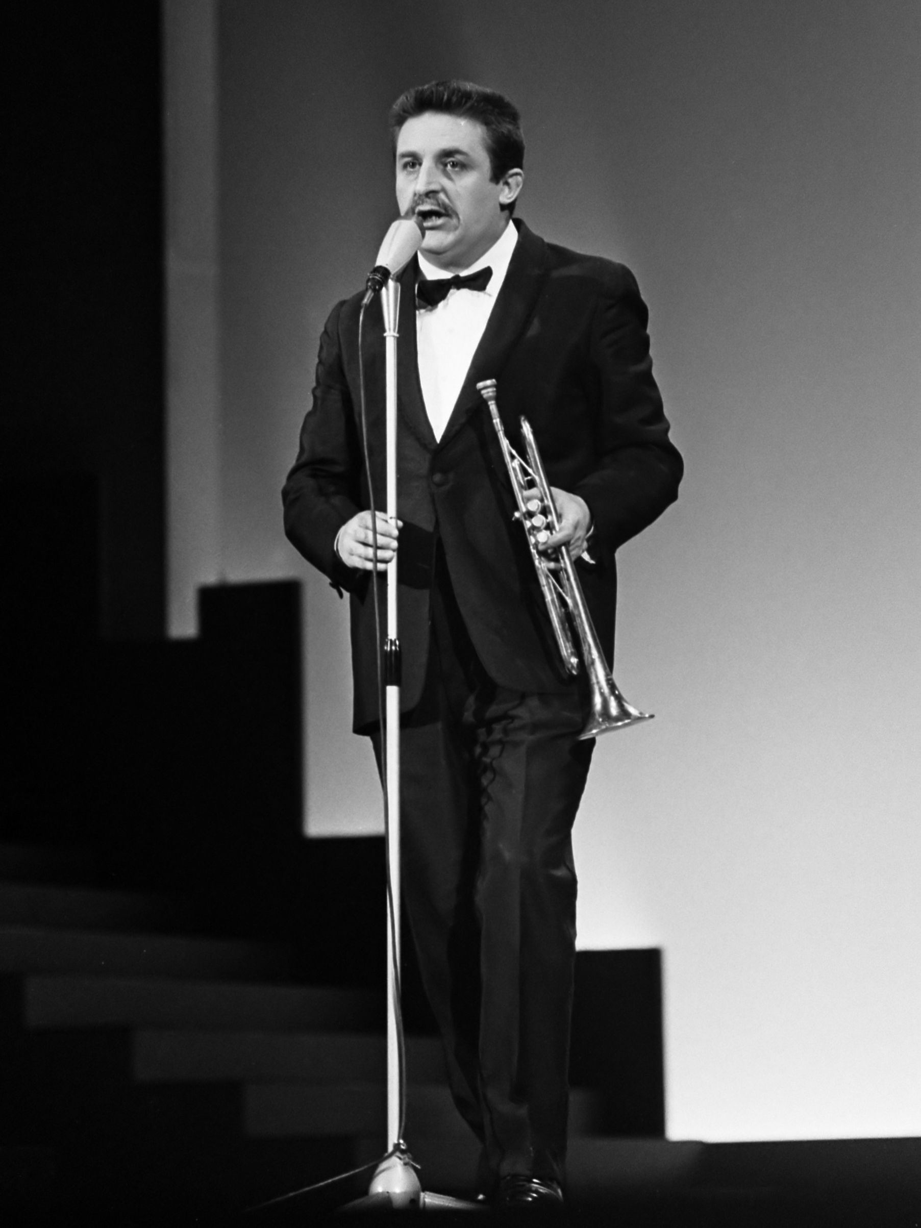 Grand Gala du Disque Populaire in Congrescentrum, Nino Rossi (sic) 7 maart 1969